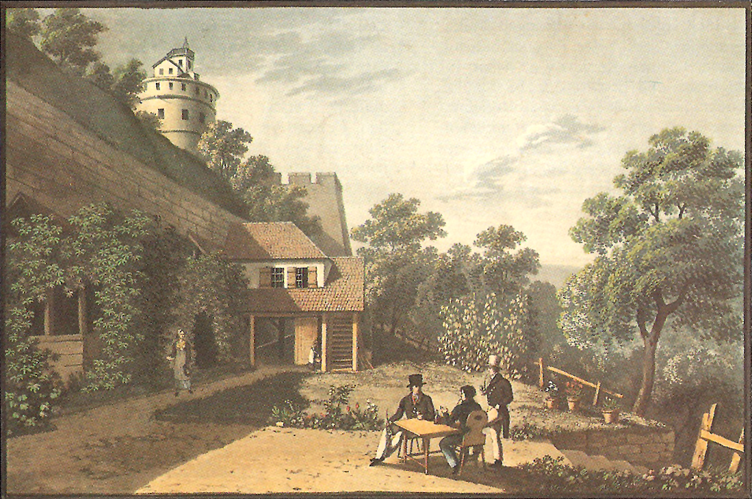 Im Garten der Schlossküferei (Aquatinta 173 × 258 mm); Schefold 9467. Studie zu Schefold 9466.